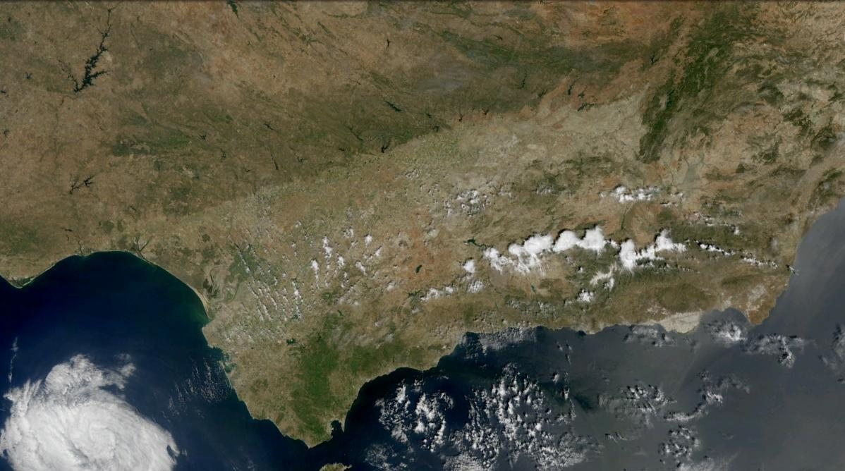 Andalusia in June 2010